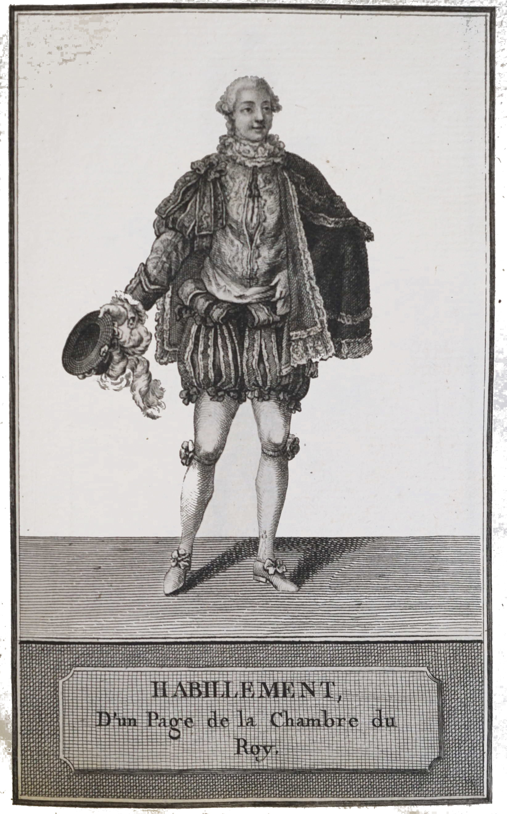 extrait du livre "Sacre et couronnement de Louis XVI ...".